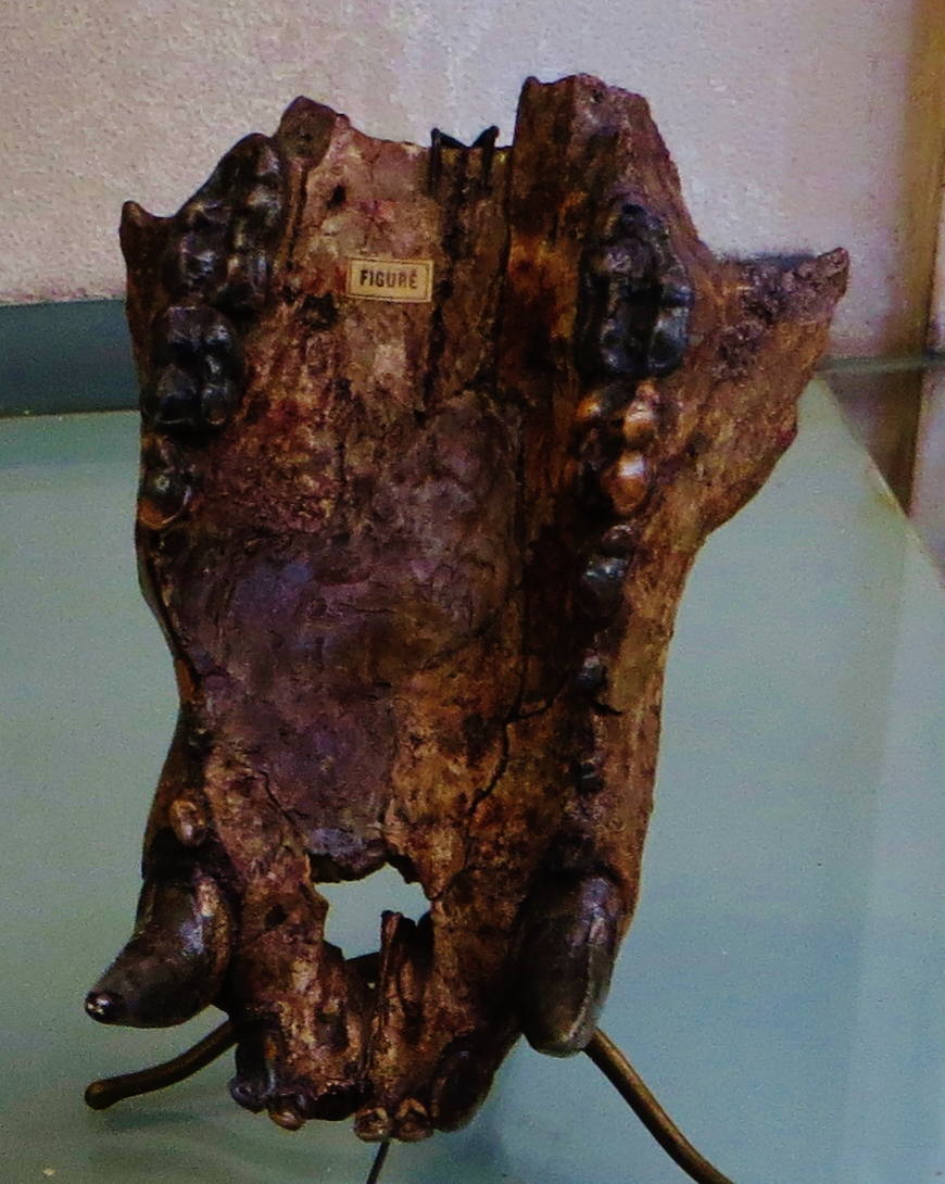 Fossil of Ursus, an extinct mammal - Took the photo at Musee d'Histoire Naturelle, Paris